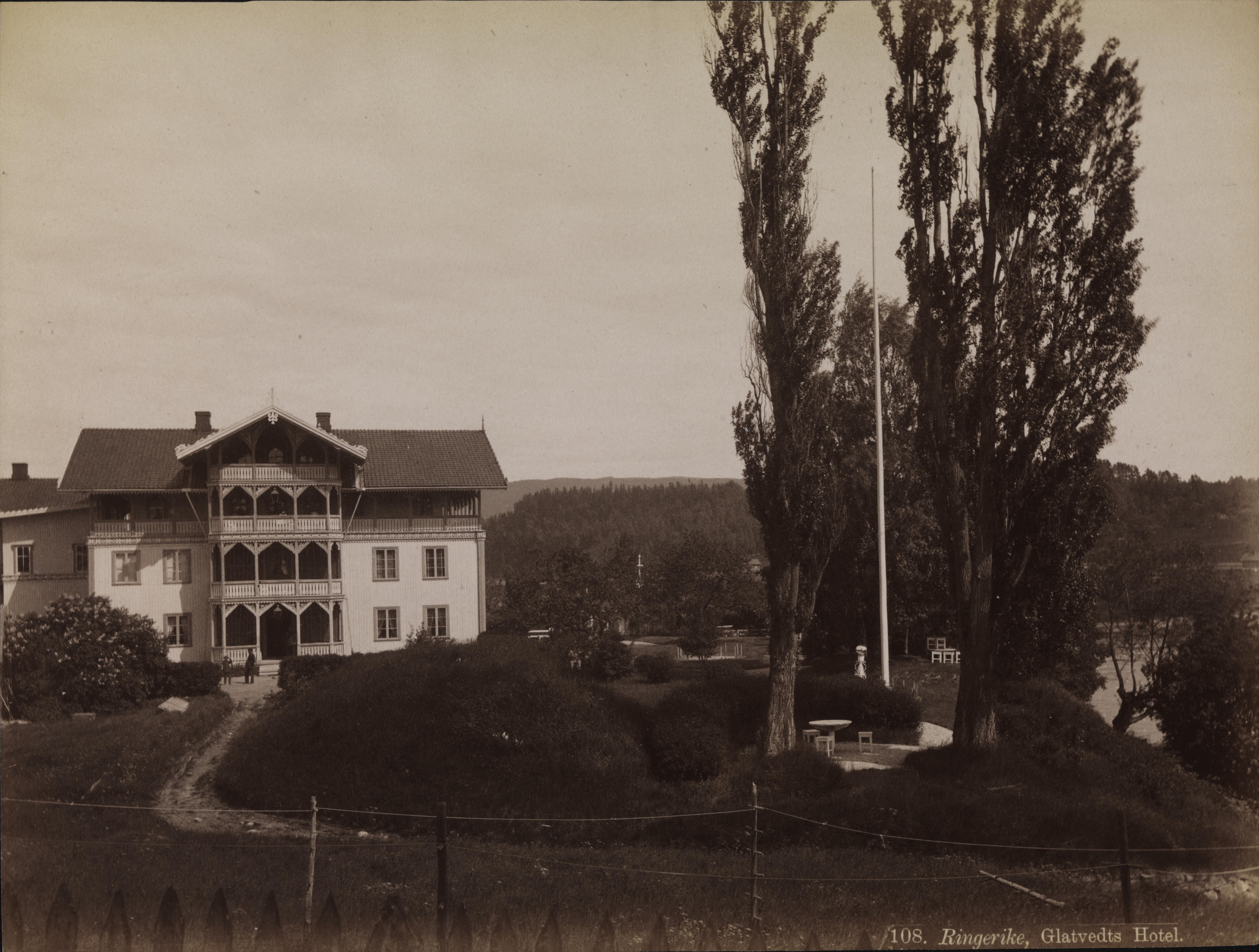 Sted: Hønefoss Kommune: Ringerike Fylke: Buskerud Tagger: eksteriør fasader hoteller arkitekturfotografi landskapsfotografi